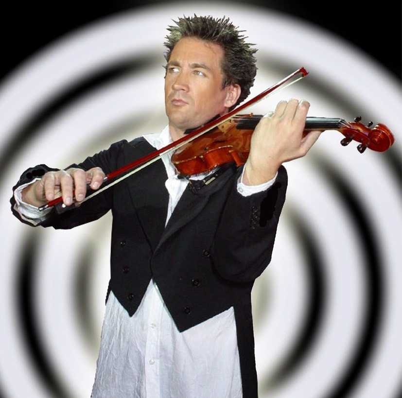 Oliver Lewis (violinist)